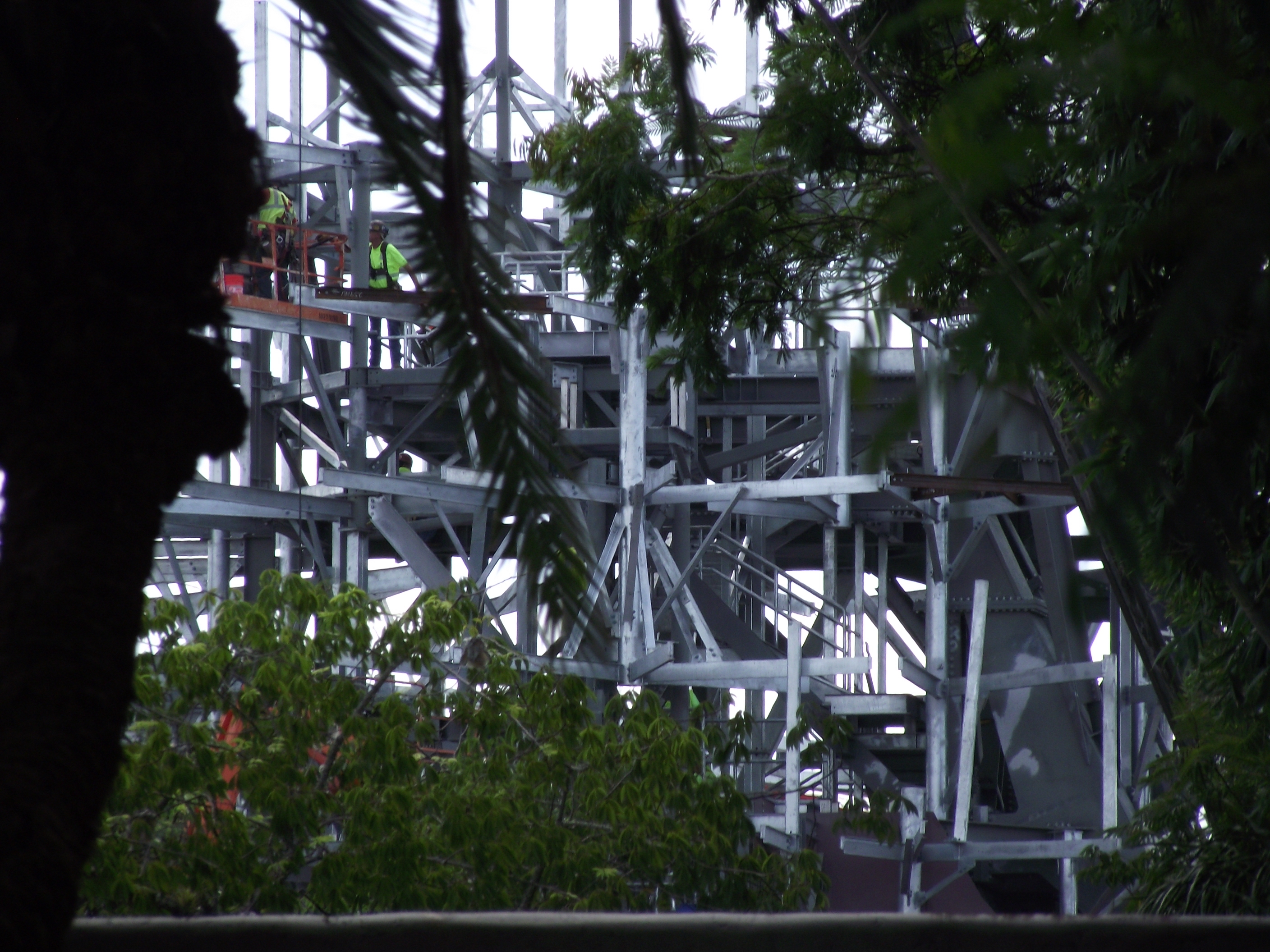 Future attraction sur le thème Avatar